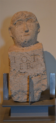 Erma del dio Termine. AE 1996, 632. Io(vi)/ Ter(mino)